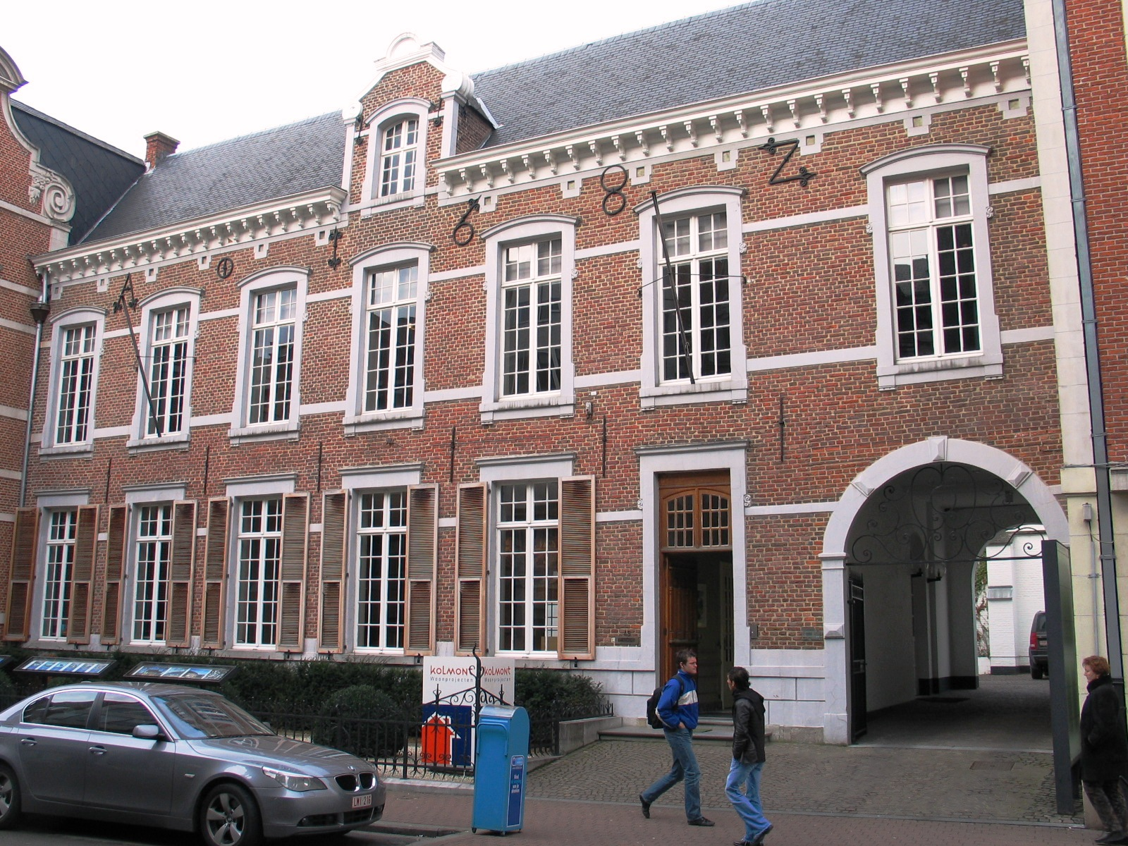 Augustijnenklooster te Hasselt - eigen foto